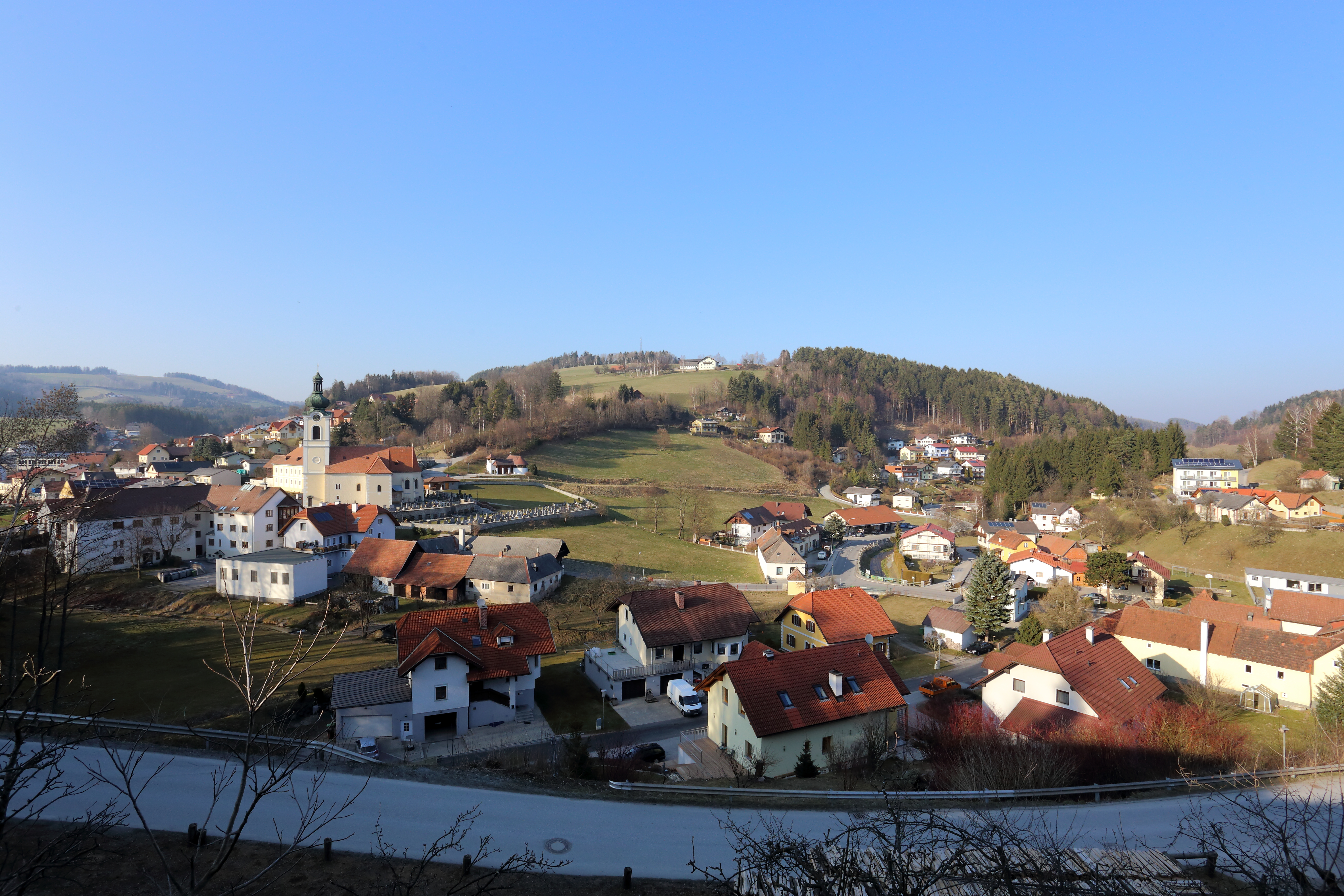 Südansicht der niederösterreichischen Gemeinde Zöbern.